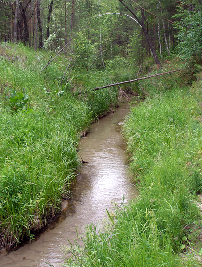 Река Власиха, Барнаульский ленточный бор.